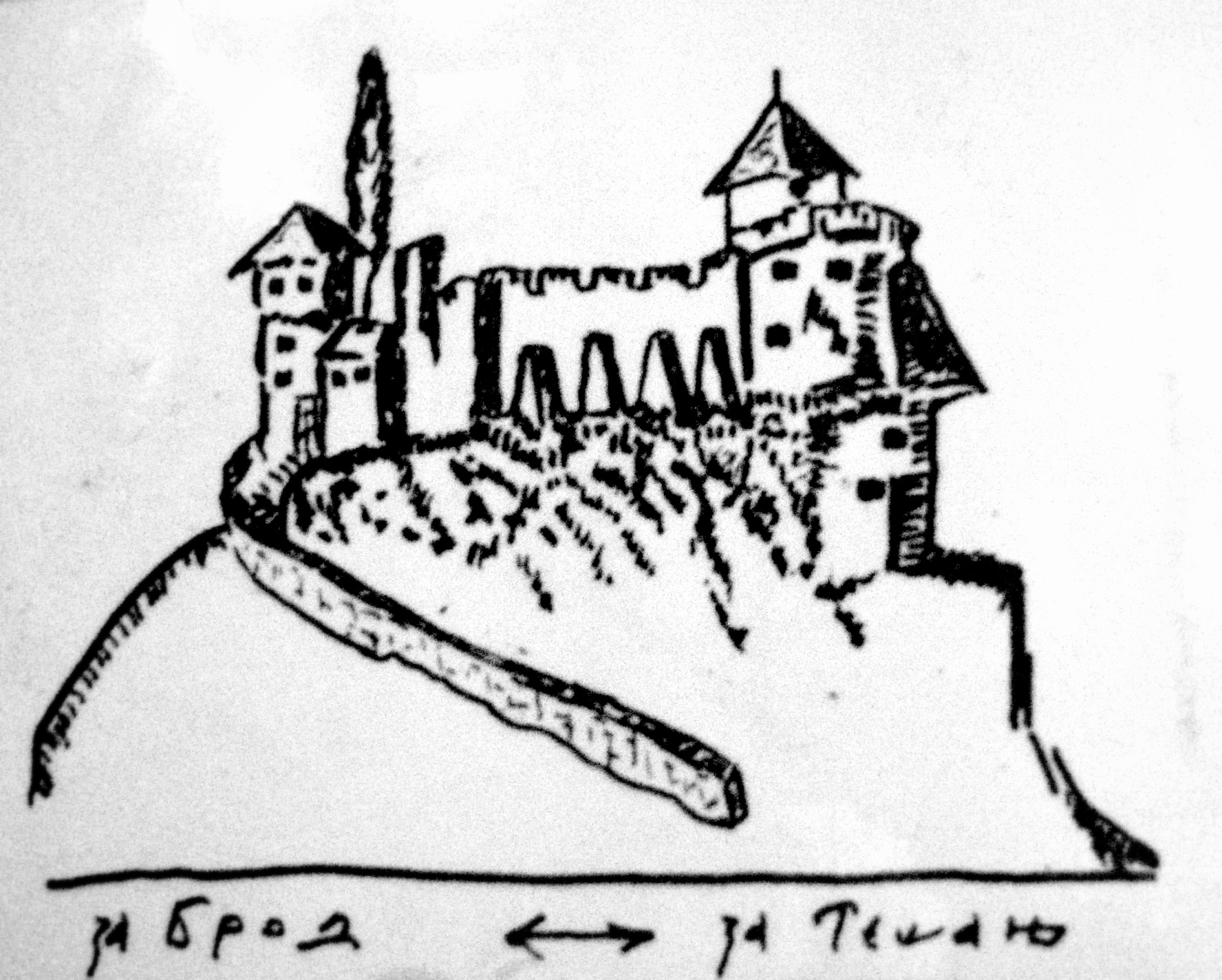 Гравура Градине са смерницама за Брод и Тешањ. Аутор: Бранко Д. Тодоровић